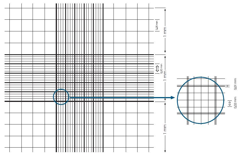 Composición del retículo de la cámara de Neubauer